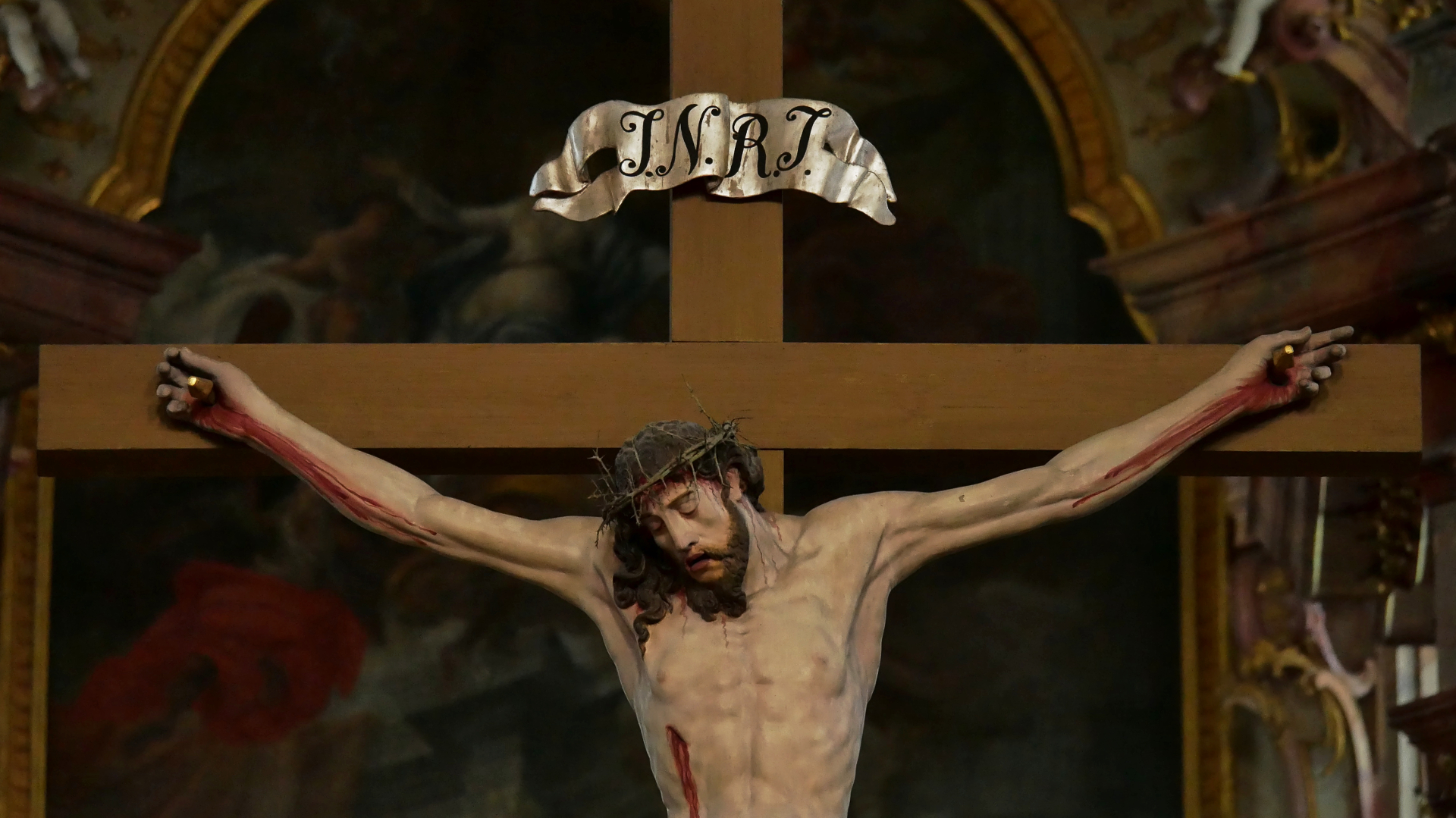 Wallfahrtskirche Maria Steinbach - Kreuz vor dem Hochchor